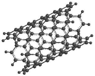 fig 6